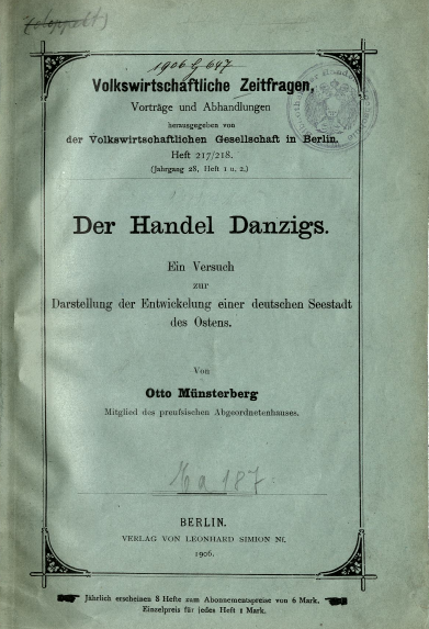 Otto Münsterberg Der Handel Danzigs 1906 Einband